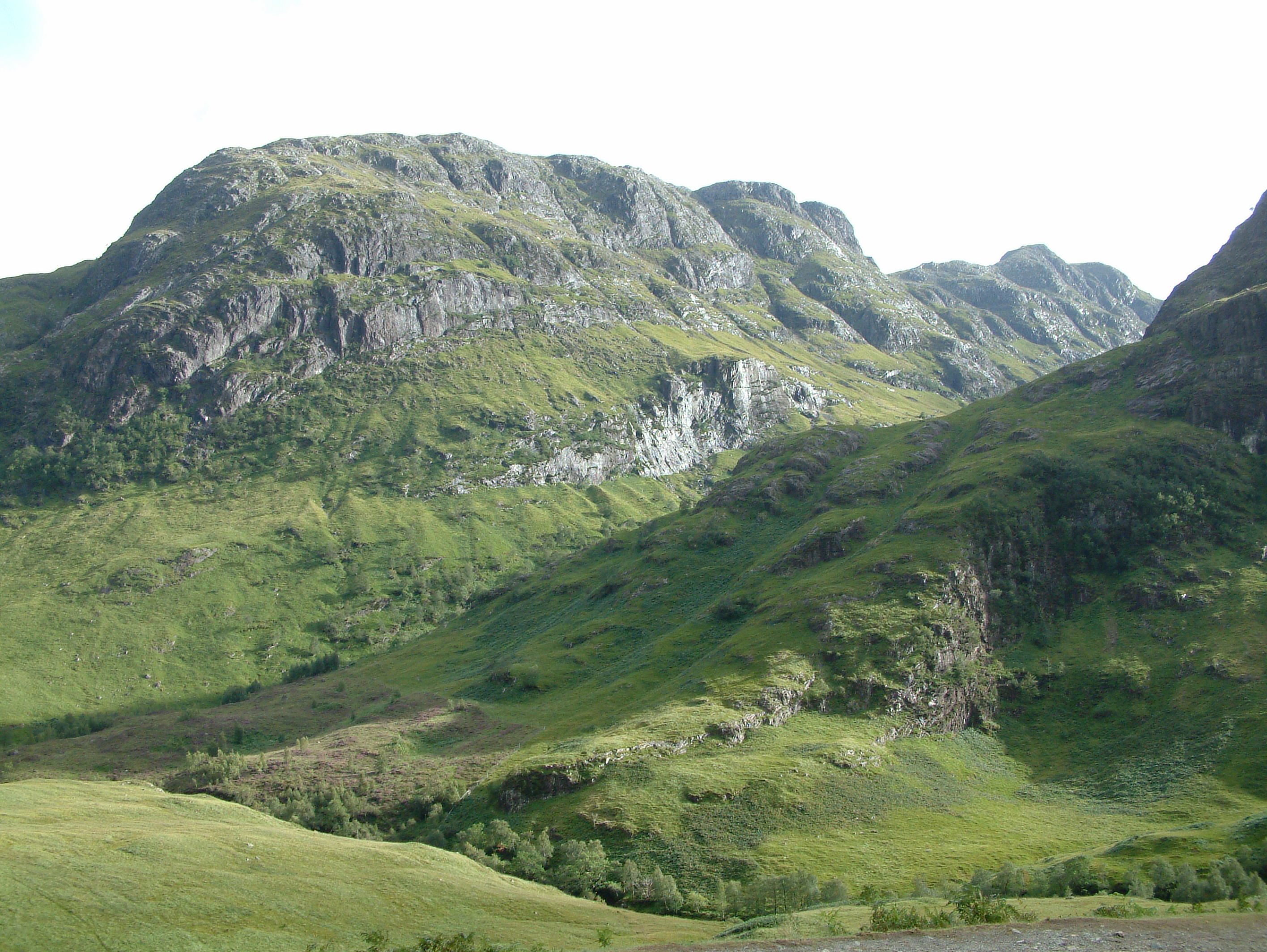 me vlastni foto